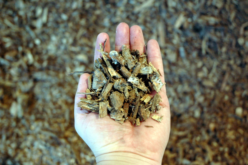 Hackschnitzel